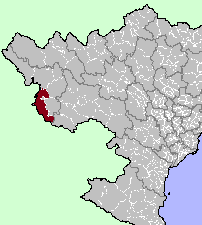 Dien Bien District, Dien Bien Province, Vietnam.